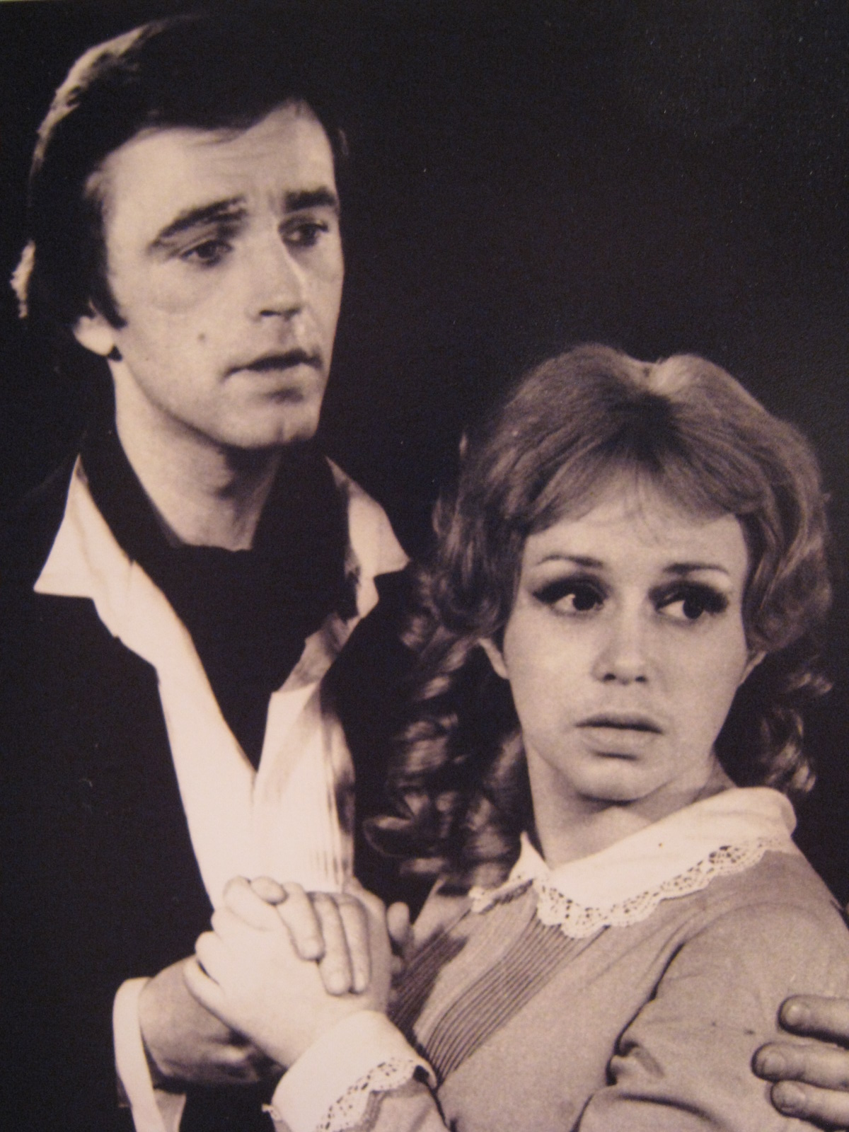 Сцена из спектакля «Овод» Ленинградского государственного театра им. Ленинского комсомола. В роли Артура Алексей Арефьев, в роли Джим Татьяна Кудрявцева. Режиссёр-постановщик Егоров Геннадий Семёнович.